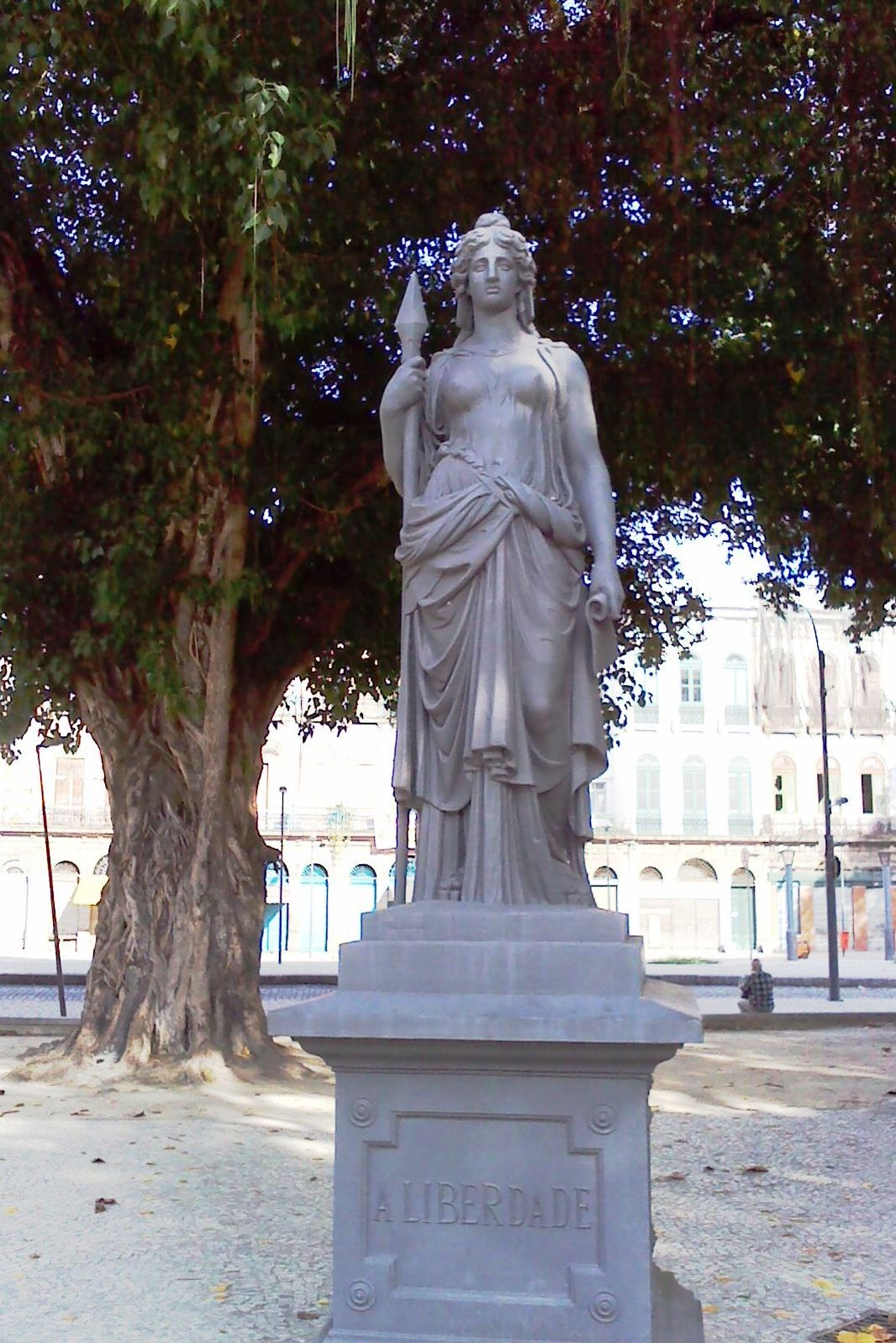 Fundição Val D'Osne: estátua em ferro fundido "A Liberdade", praça Tiradentes, centro histórico do Rio de Janeiro, estado do Rio de Janeiro, Brasil.